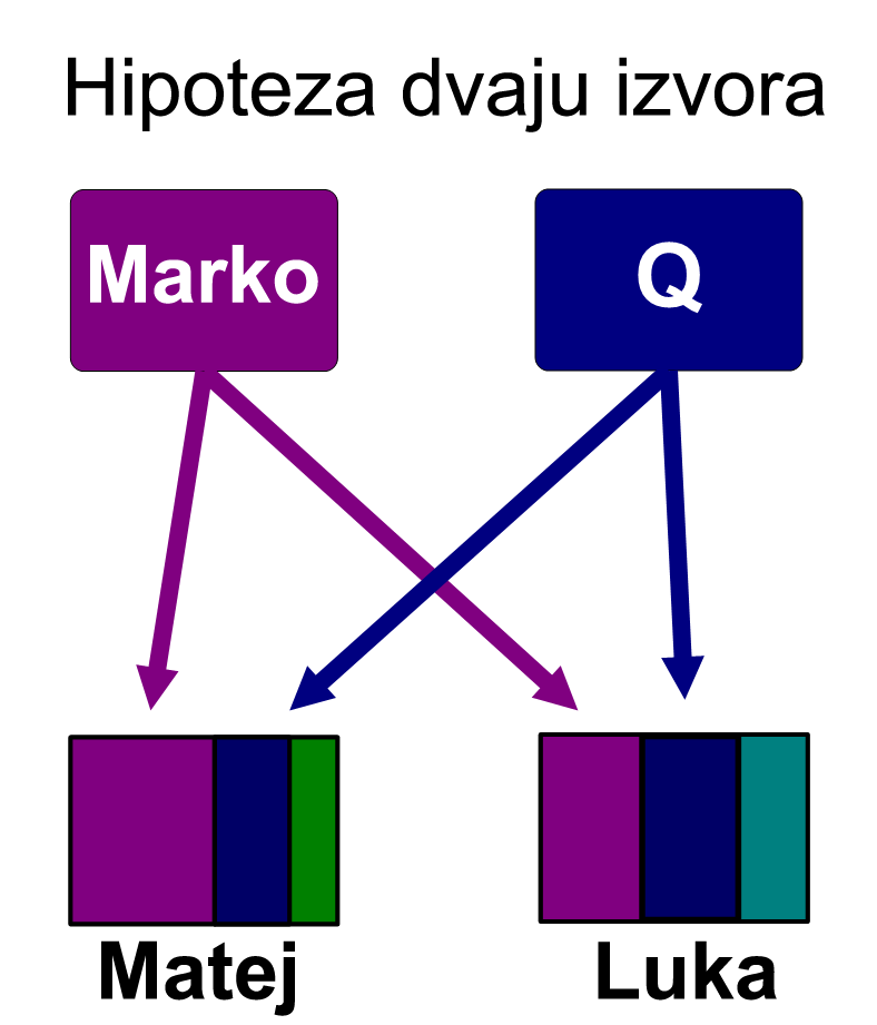 Srpskohrvatski / српскохрватски: Hipoteza dvaju izvora, vezana za sinoptički problem. Prema hipotezi dvaju izvora, Evanđelja po Mateju i Luki su pisana zasebno, oba koristeći Evanđelje po Marku i „Q dokument“ kao izvore.